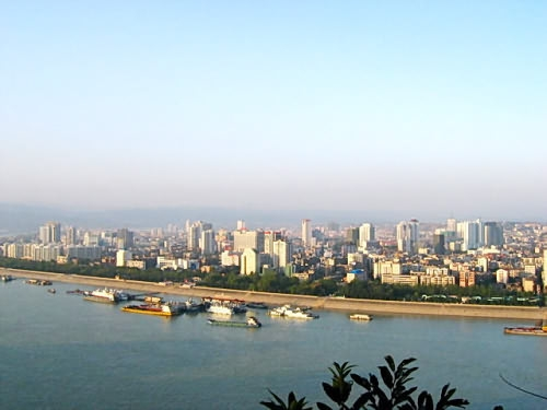 宜昌市 Bân-lâm-gú: Gî-tshiong-tshī